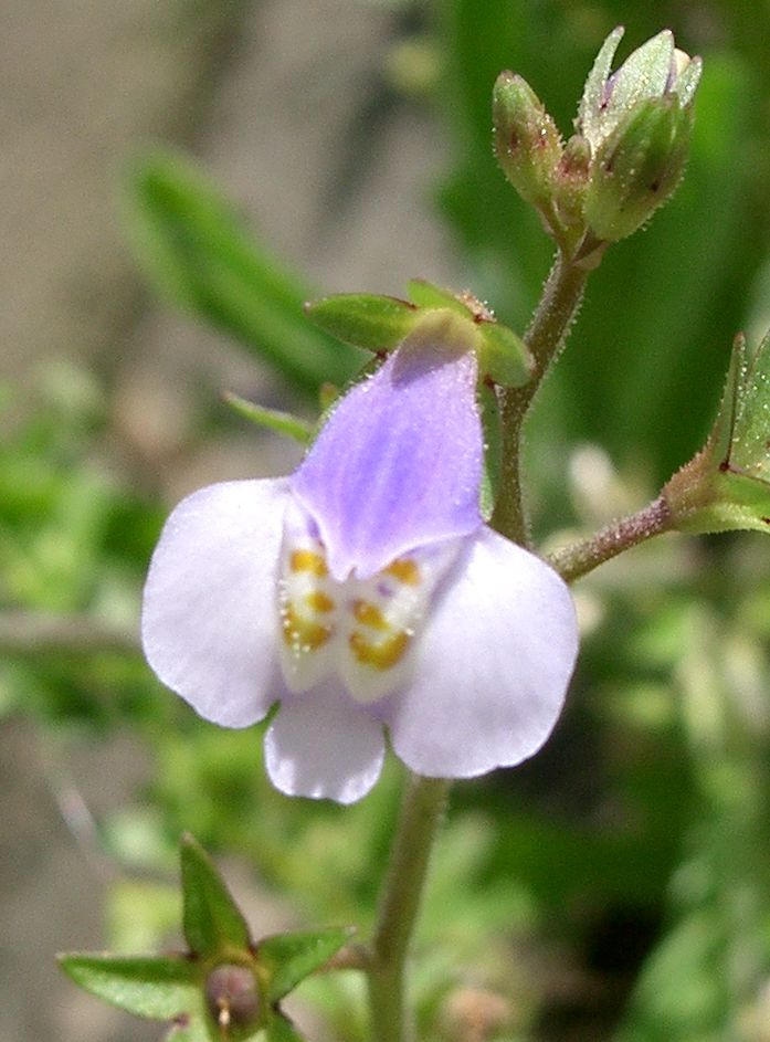 Mazus pumilus